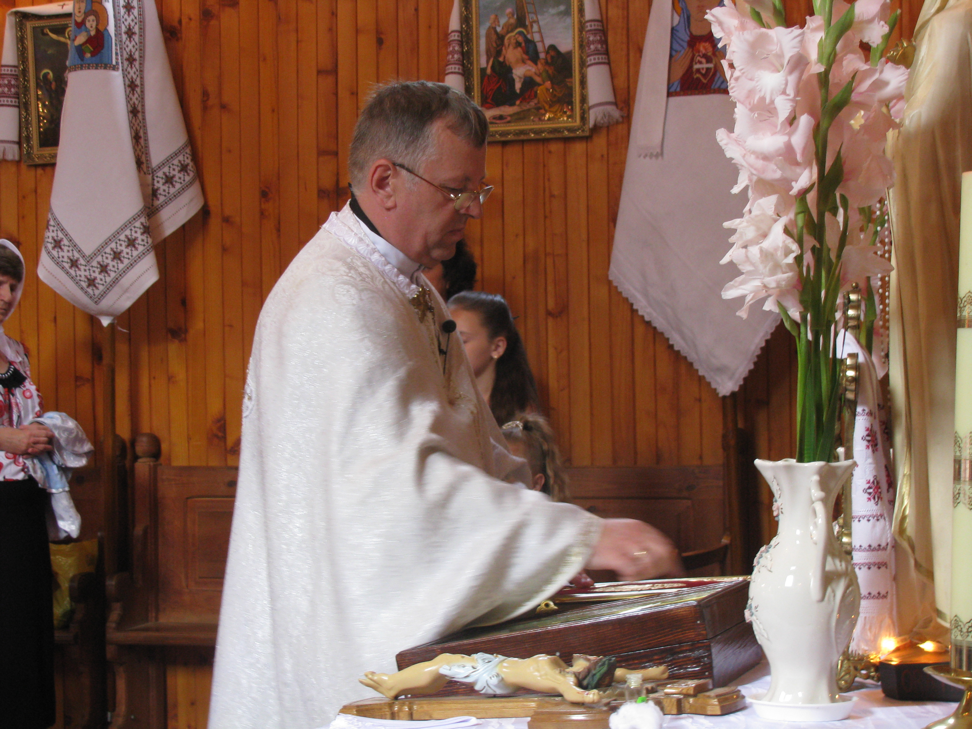 Настоятель храму св. влмуч. Юрія о. Василь Крошний